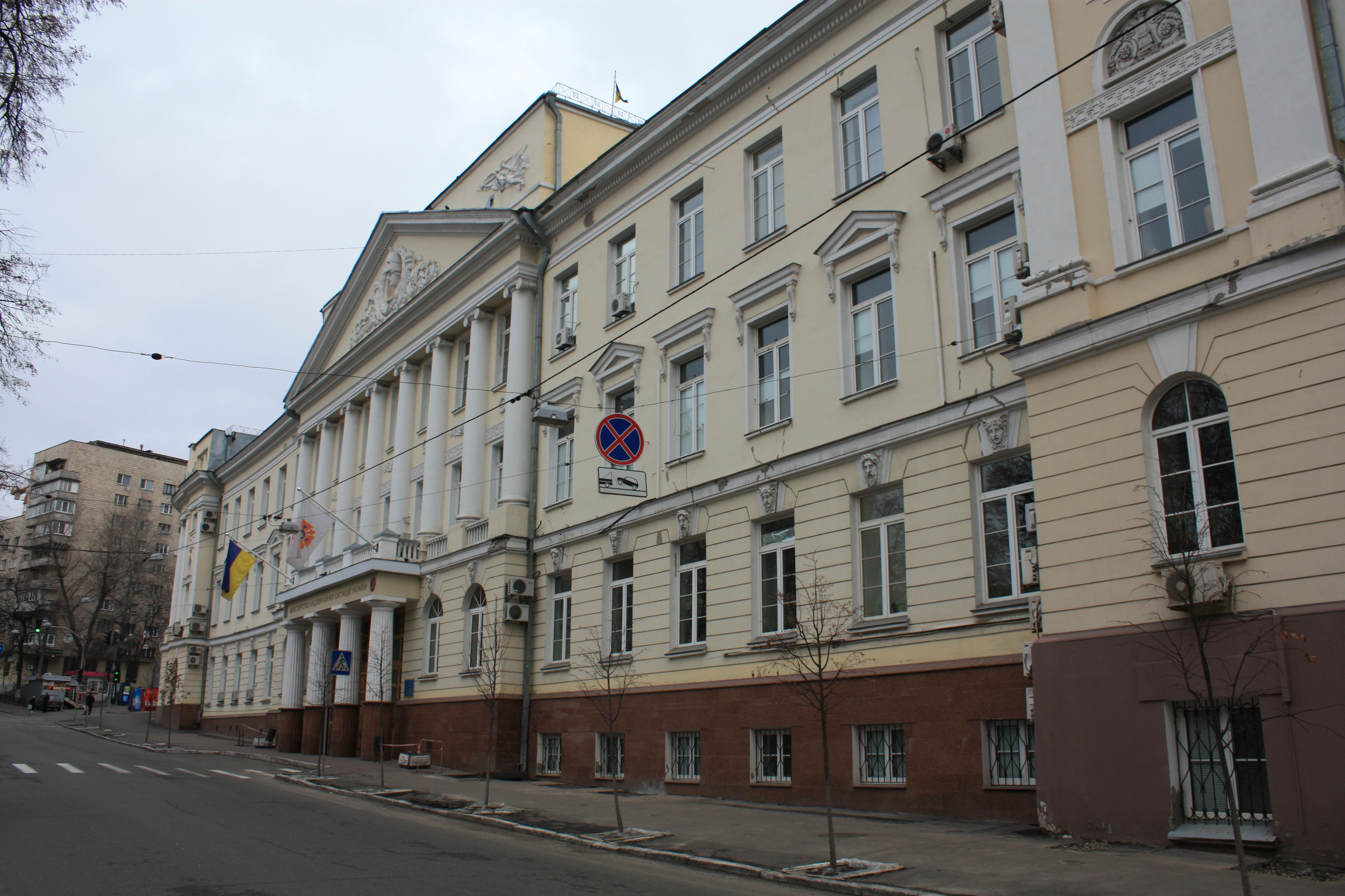 Київ, вул. Олеся Гончара, 55-а